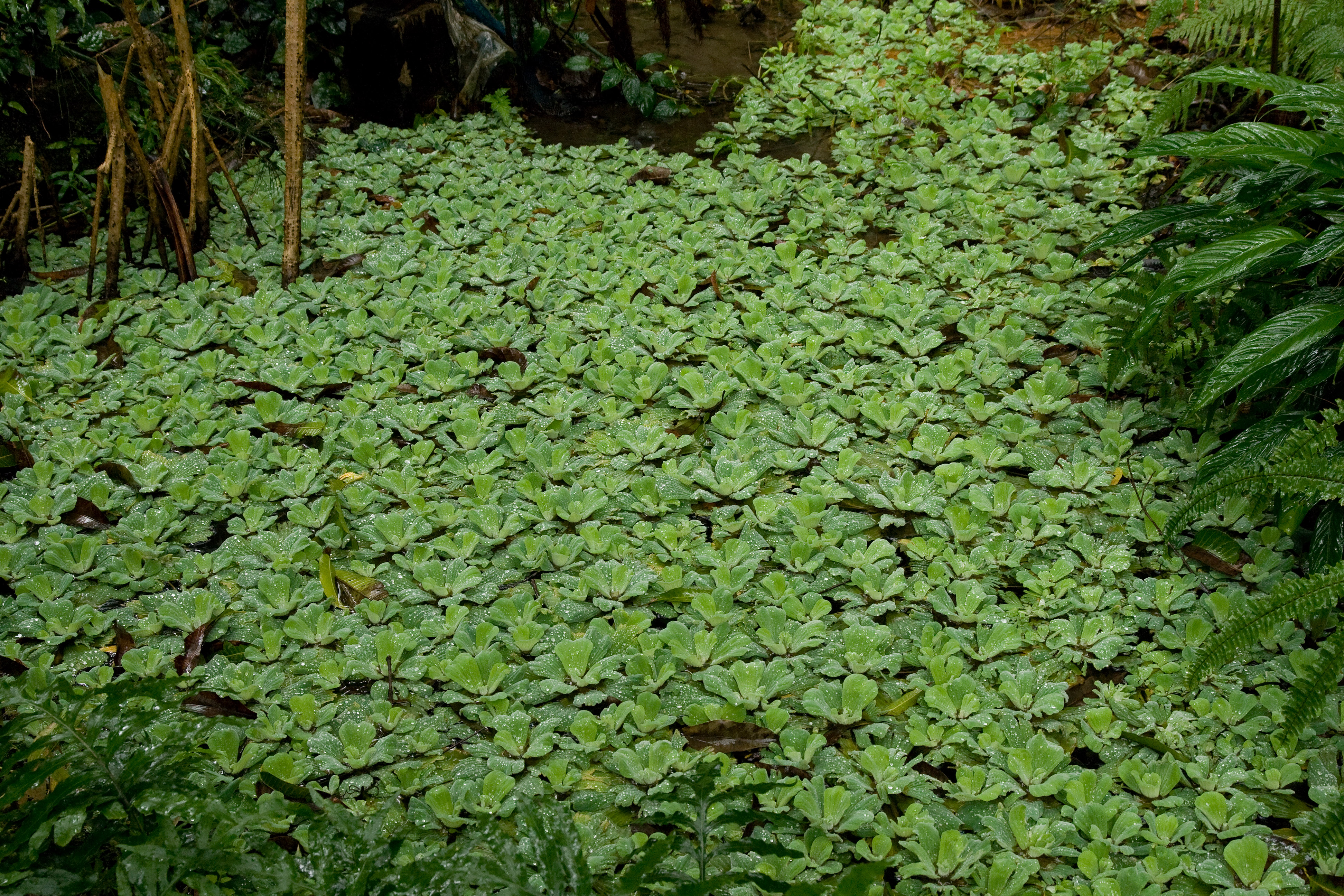 ボタンウキクサ (学名:Pistia stratiotes)